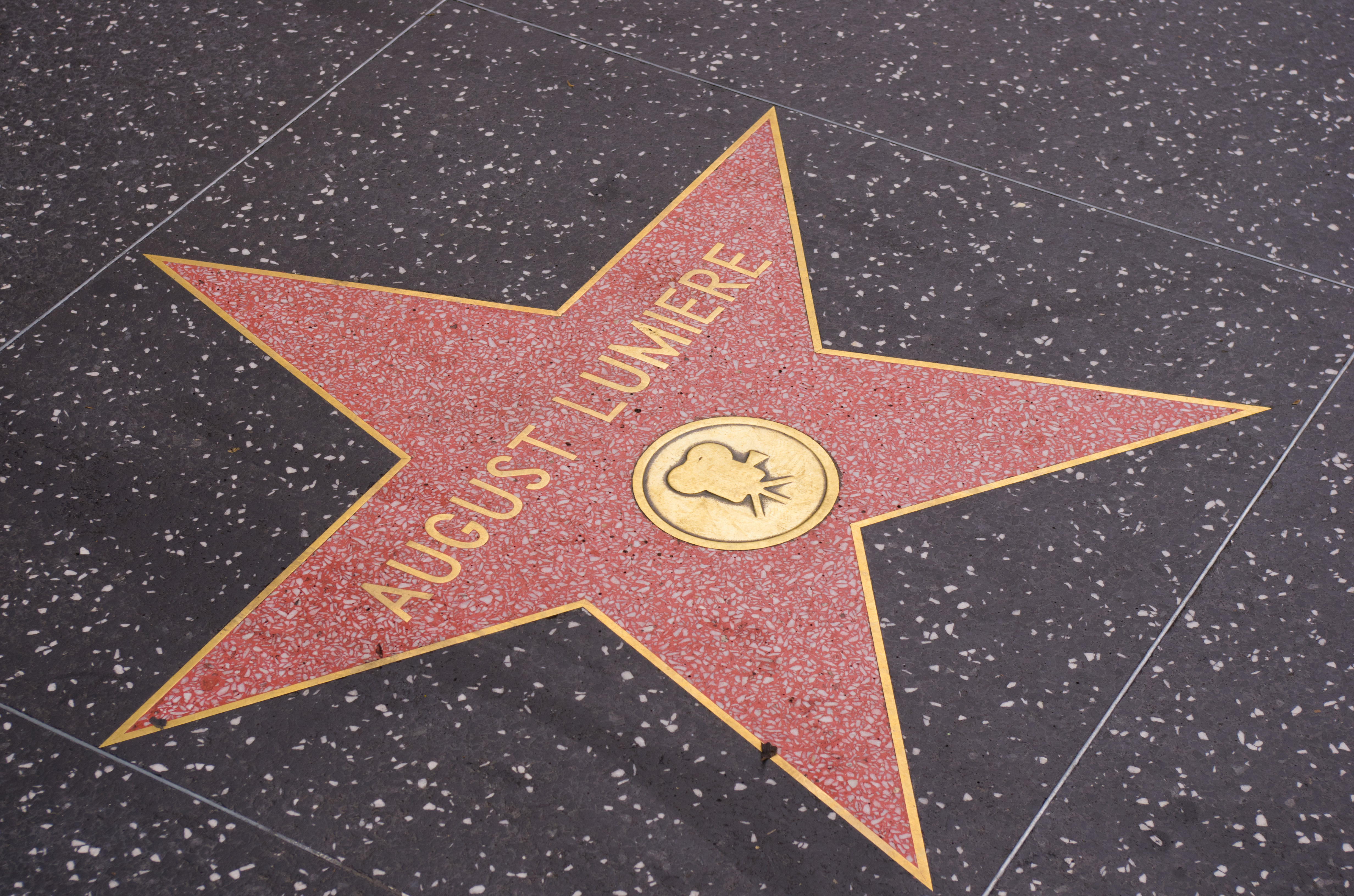 August Lumierère star on the Walk of Fame